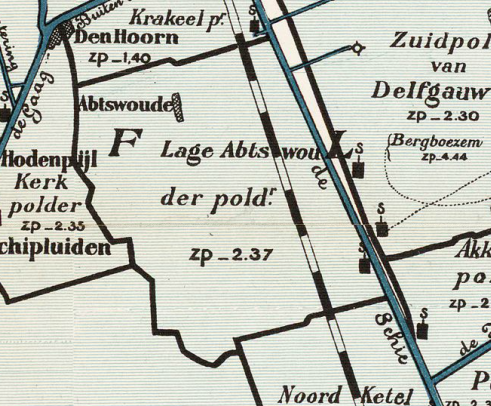 Lage_Abtwoudsche_polder